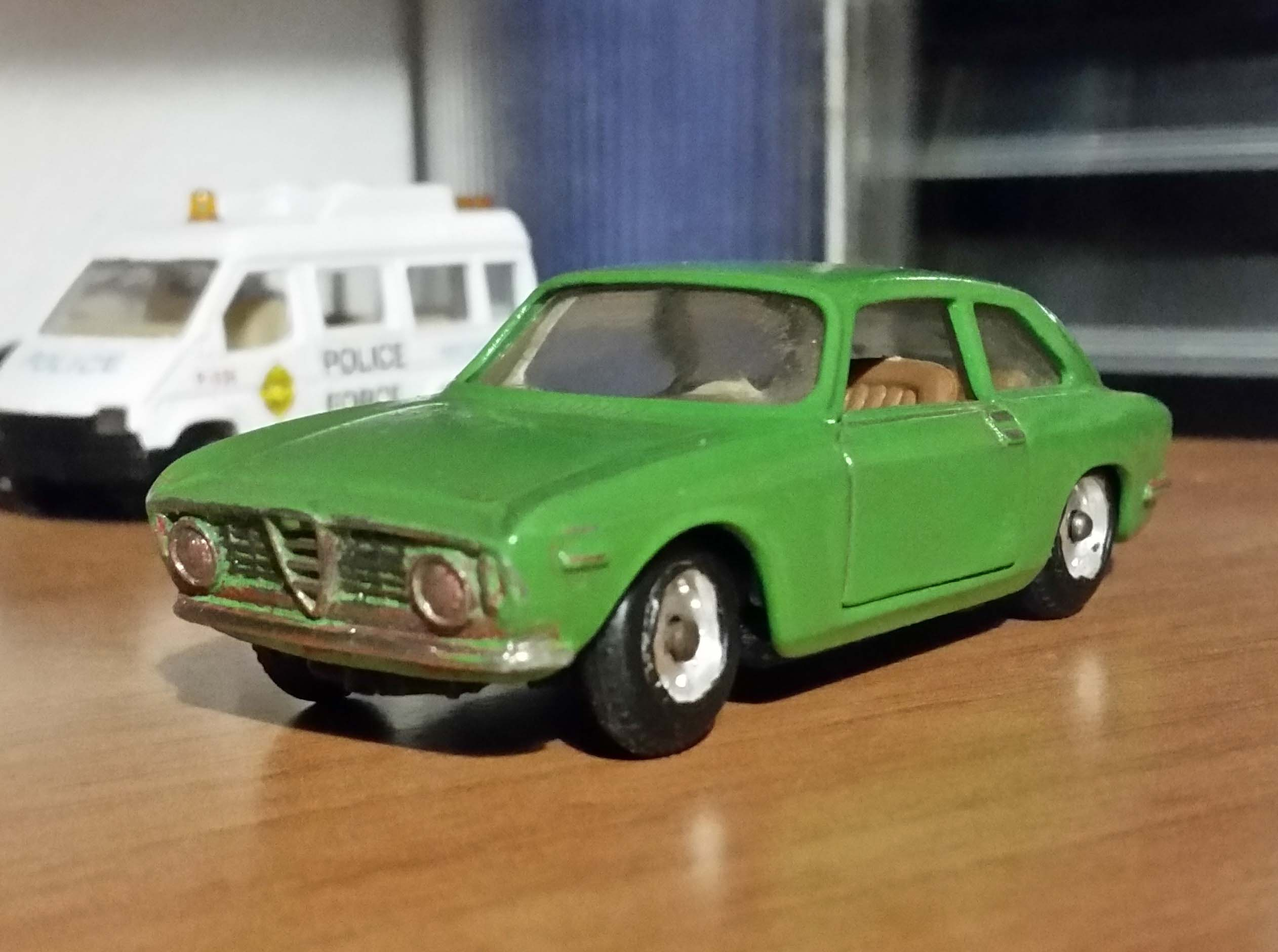 Modellino di Alfa Romeo Giulia GT costruito dalla cessata casa italiana Mercury